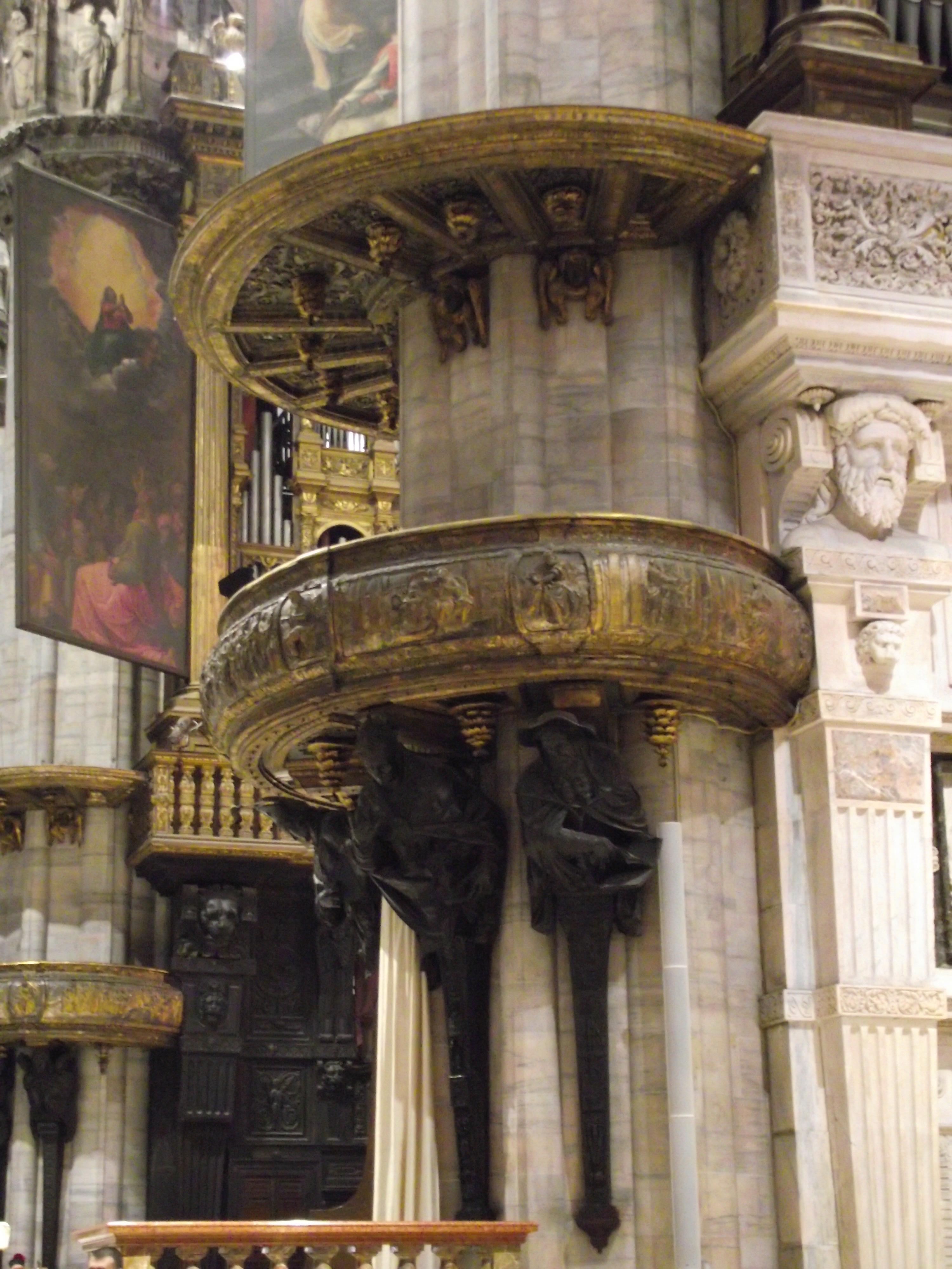 Pulpito